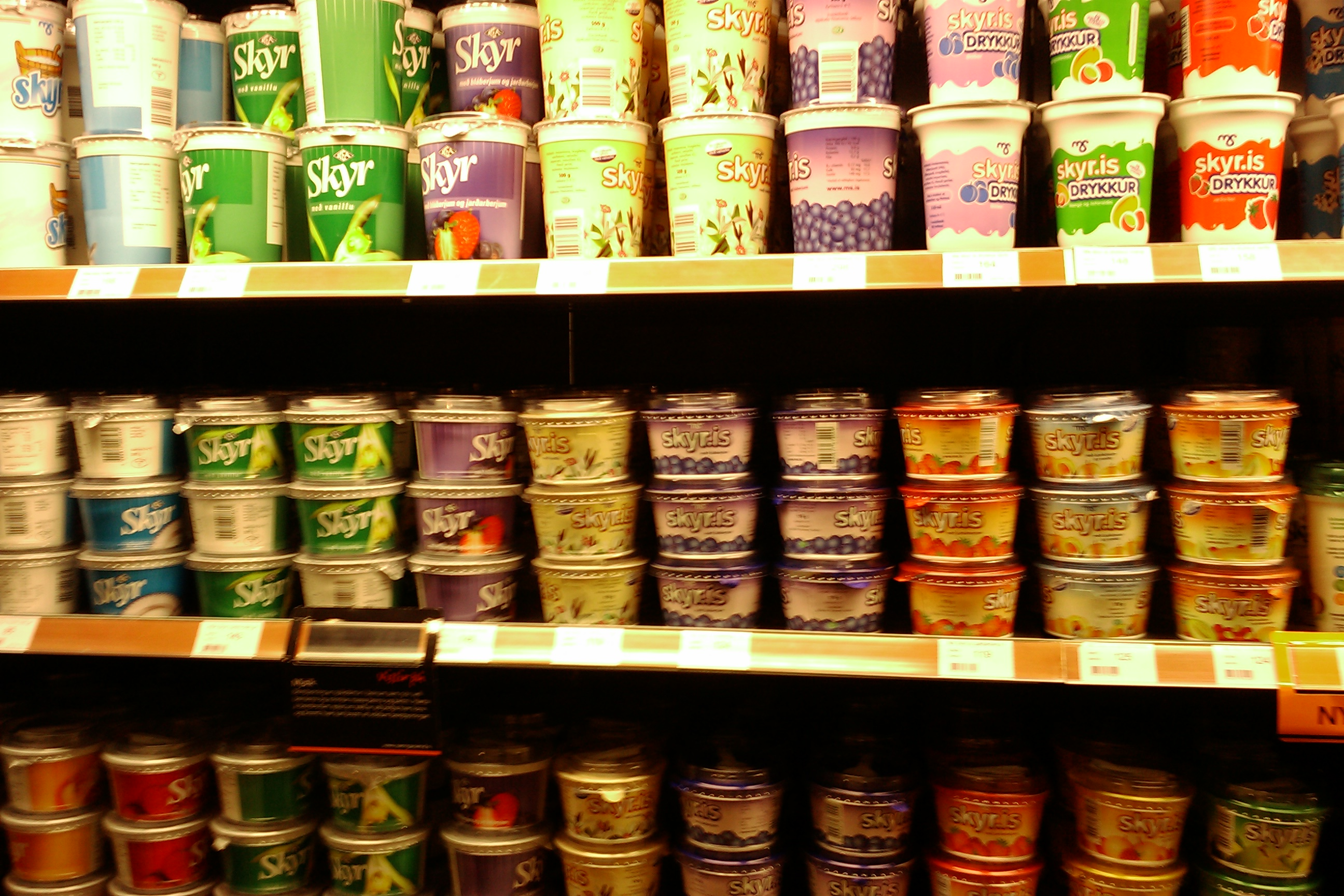 Skyrs dans un rayon de supermarché